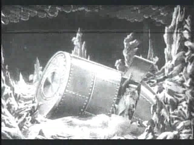 Méliès, viaggio nella luna (1902) 07